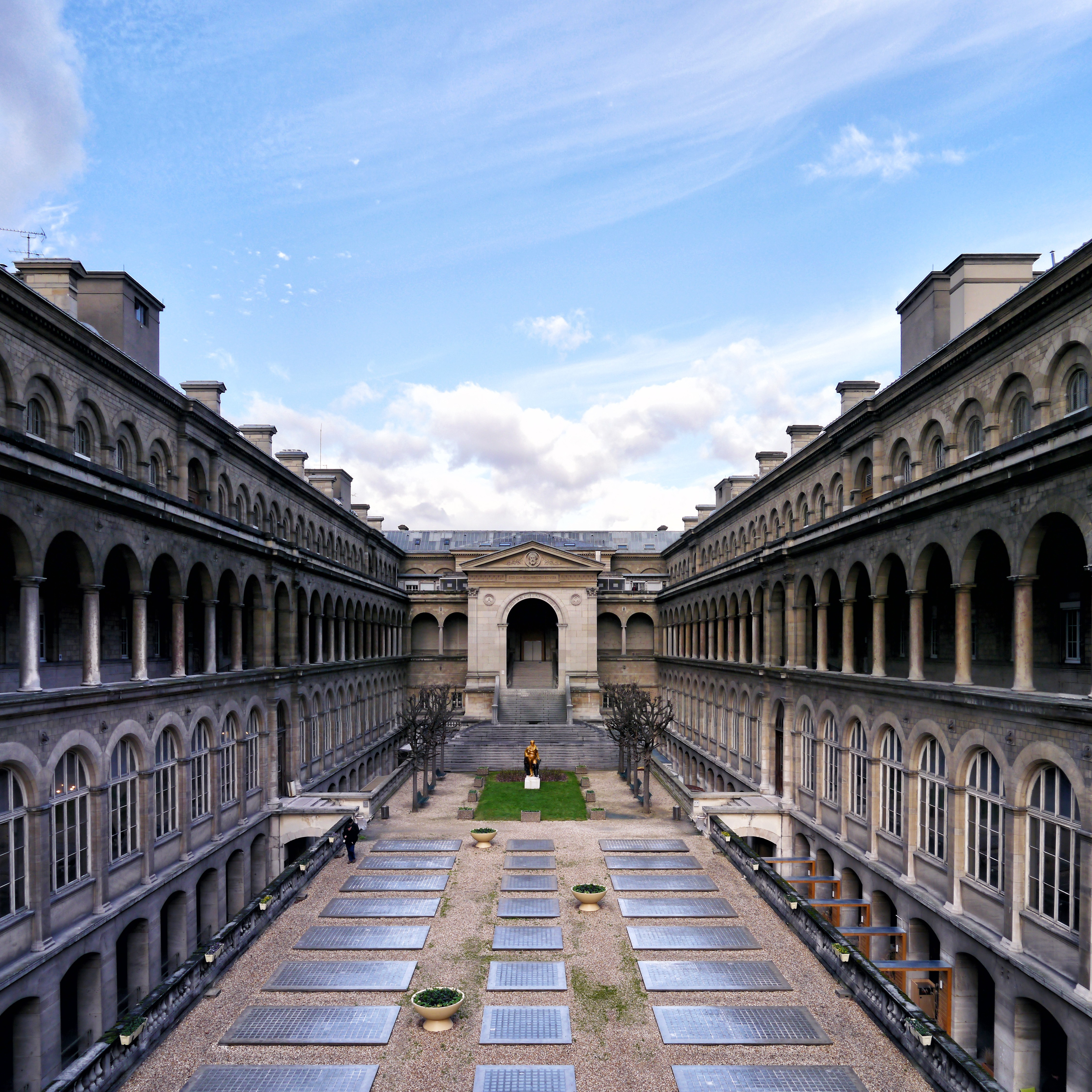 Hôtel-Dieu de Paris.